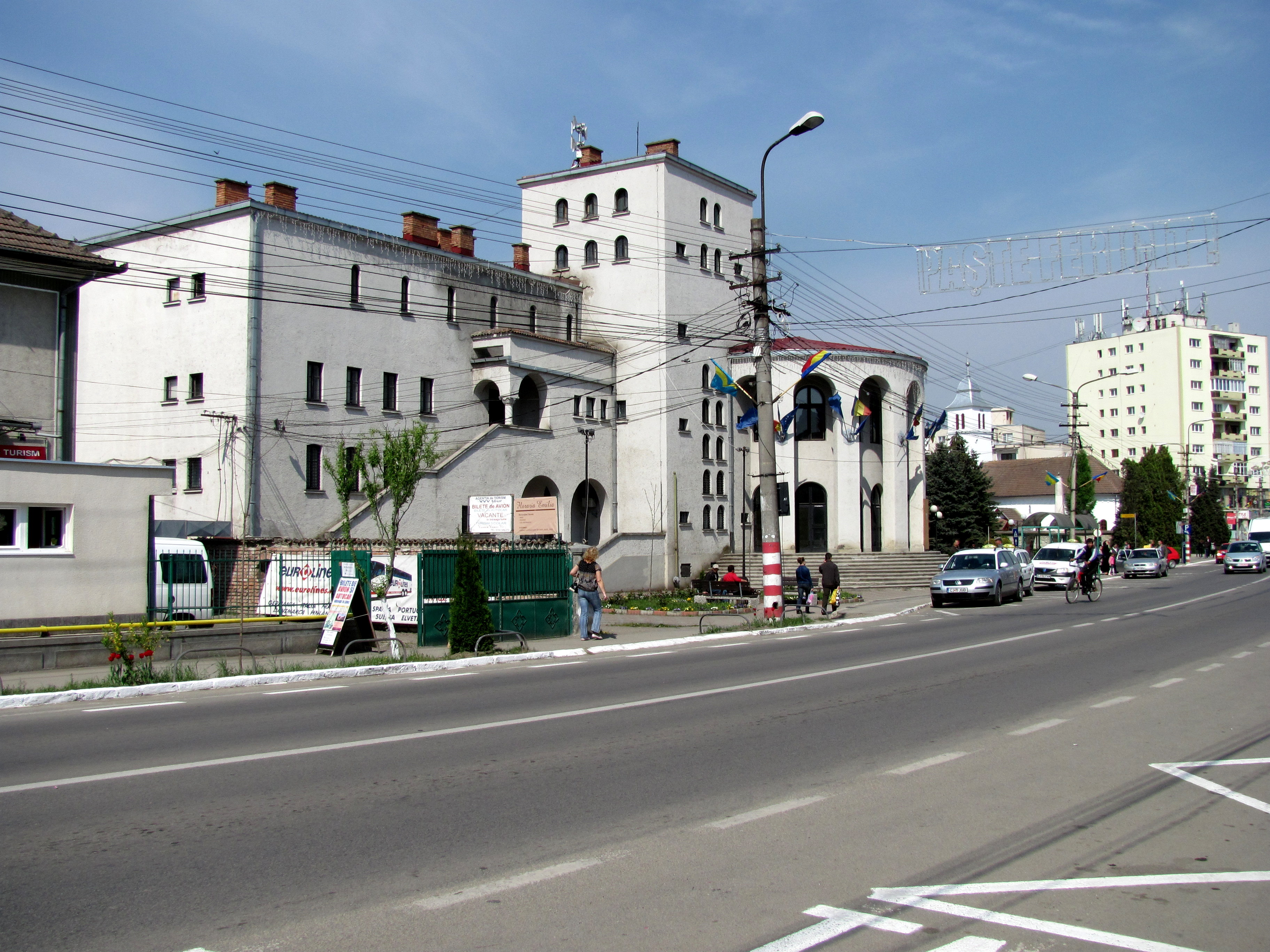 Câmpia Turzii, Piața Mihai Viteazu nr.8, Palatul Cultural „Ionel Floașiu” 01